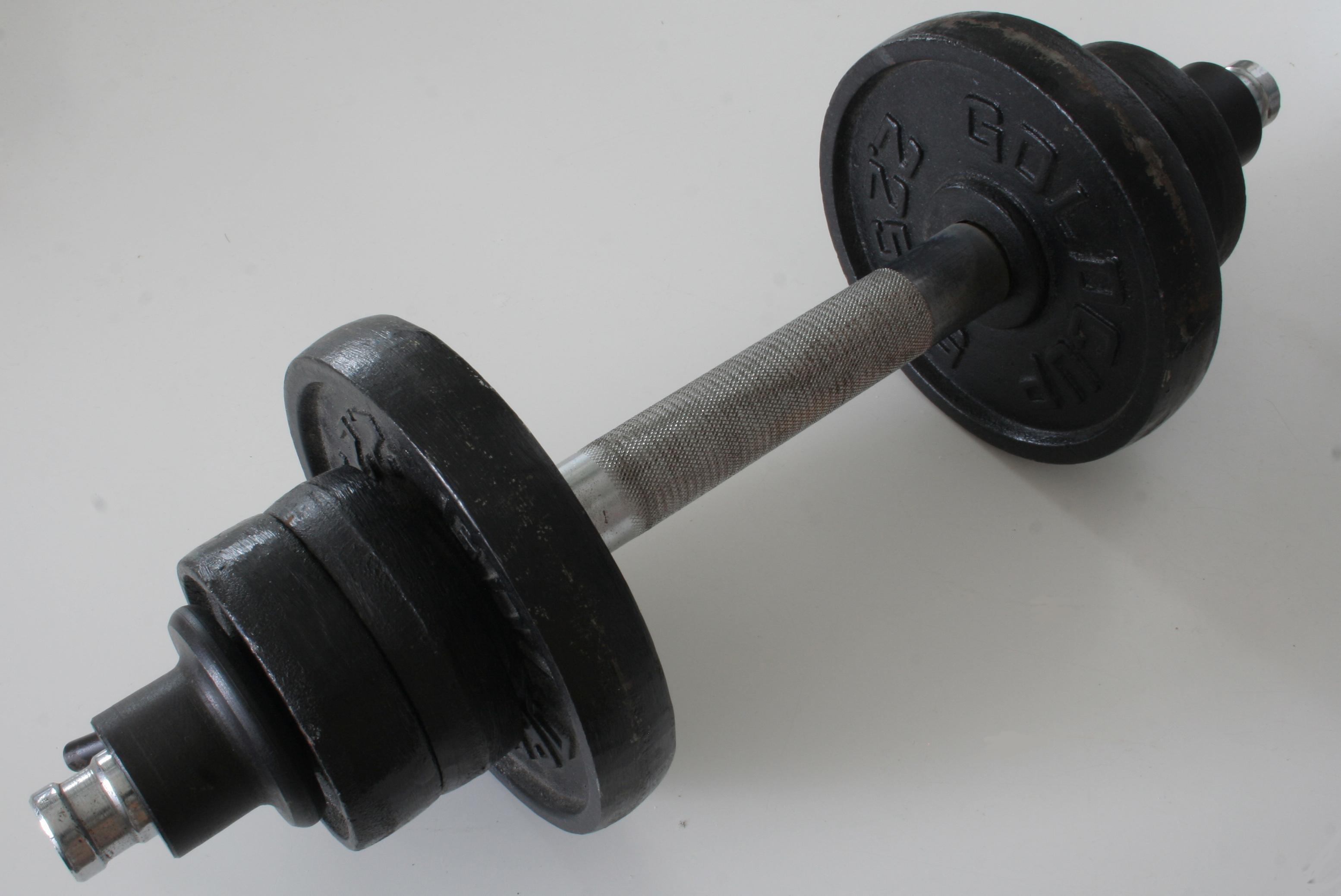 Halter